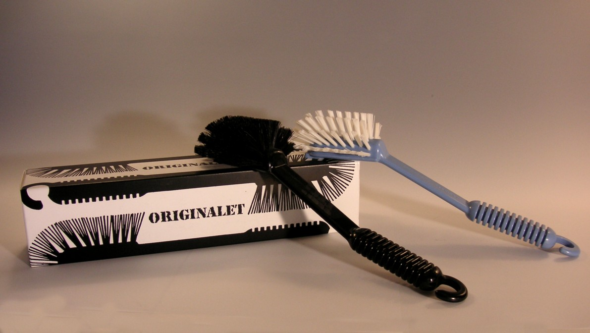 A & E Design, diskborste 1975